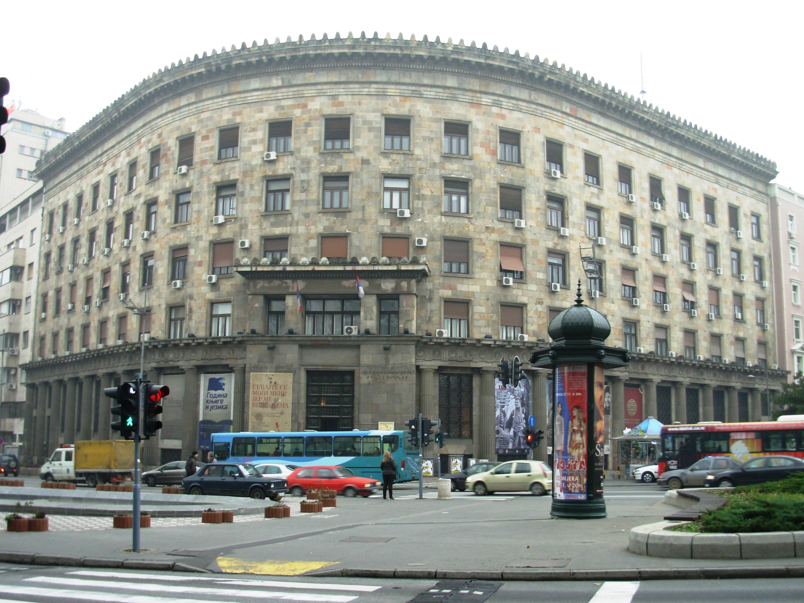 Зграда Централног комитета СКЈ, где је био смештен, после Другог светског рата. ЦК се после преселио у нову зграду на Новом Београду. Сликао Голдфингер